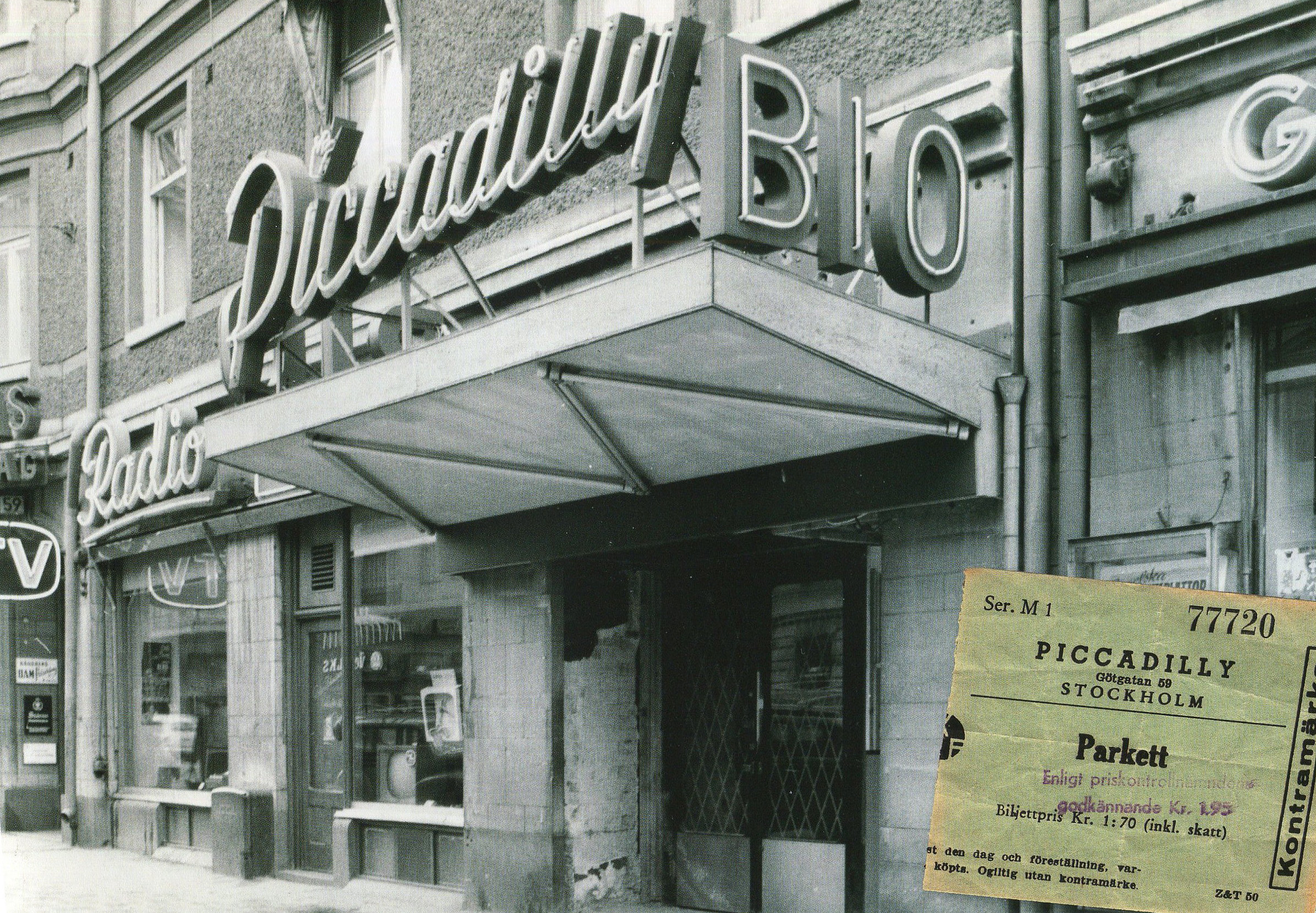 Bio Piccadilly